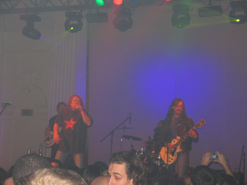 KUD Idijoti, Belgrade SKC